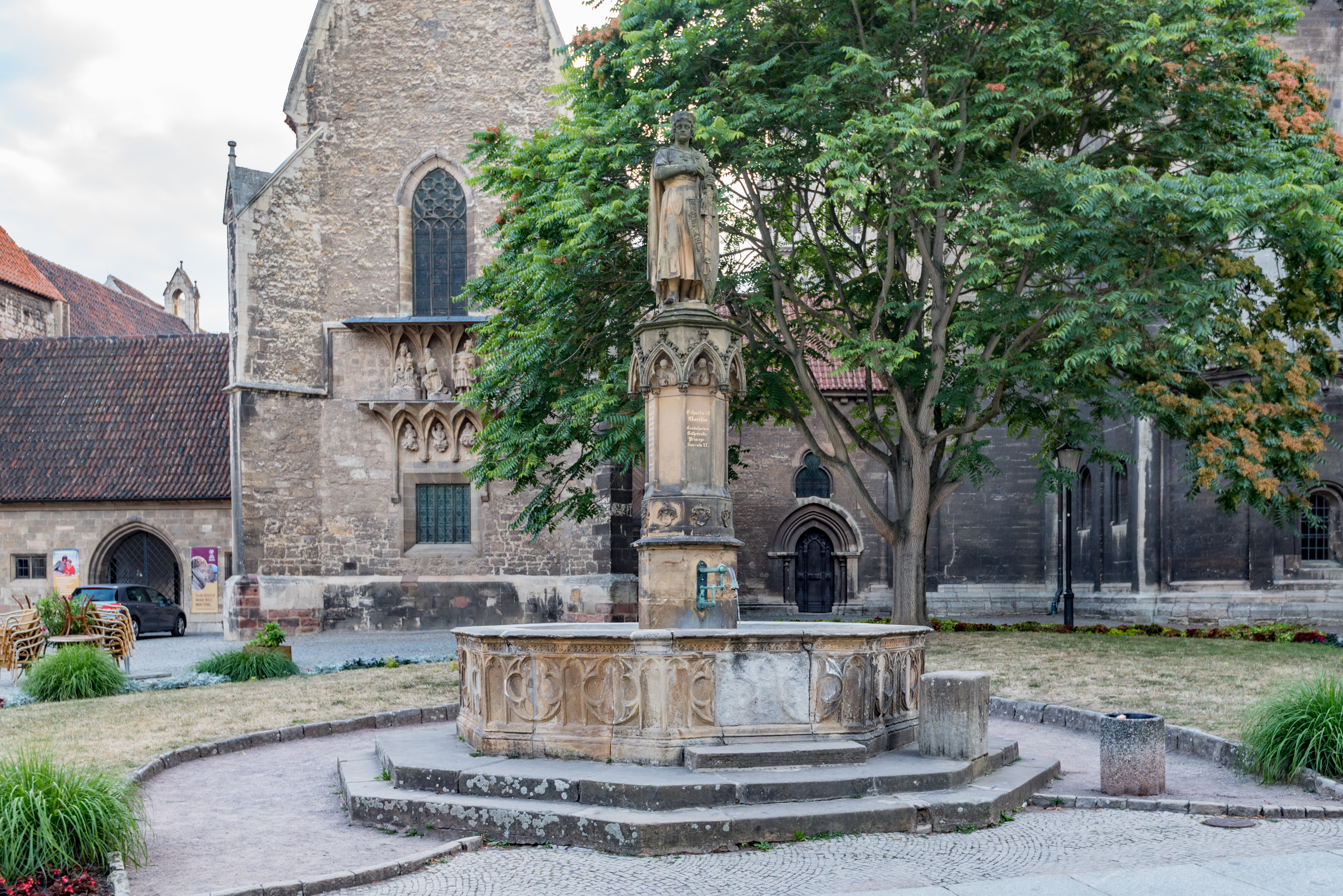 Naumburg (Saale), Domplatz, Ekkehard-Brunnen